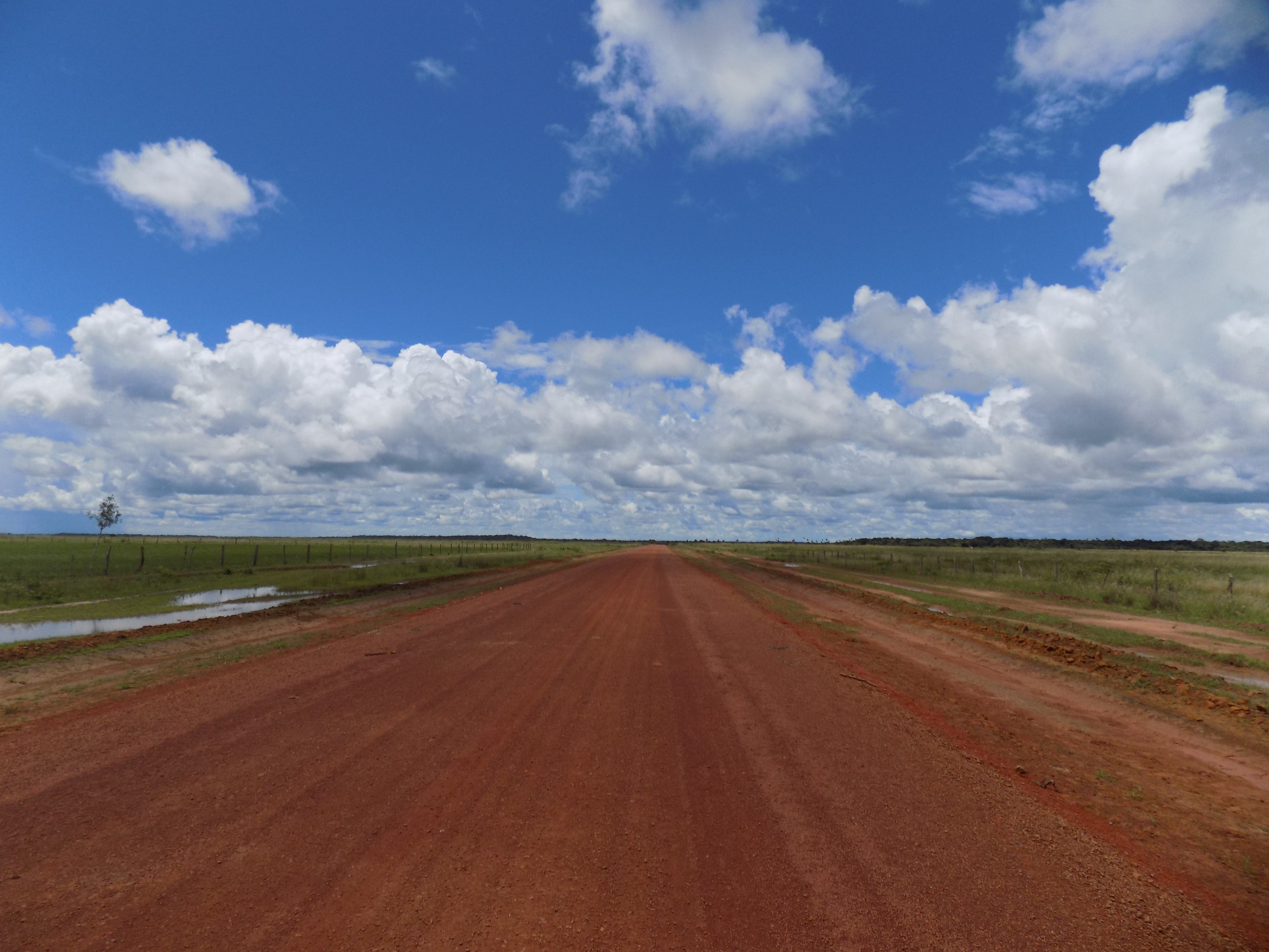 Esta carretera está construida con tierra (ripio) en su totalidad .Las deficiencias en la infraestructura vial del departamento (Vichada) dificultan el transporte terrestre, lo que se traduce en elevados costos para el transporte de personas, de mercancías y/o insumos. En esta región la forma más eficiente para desplazarse es por vía fluvial.